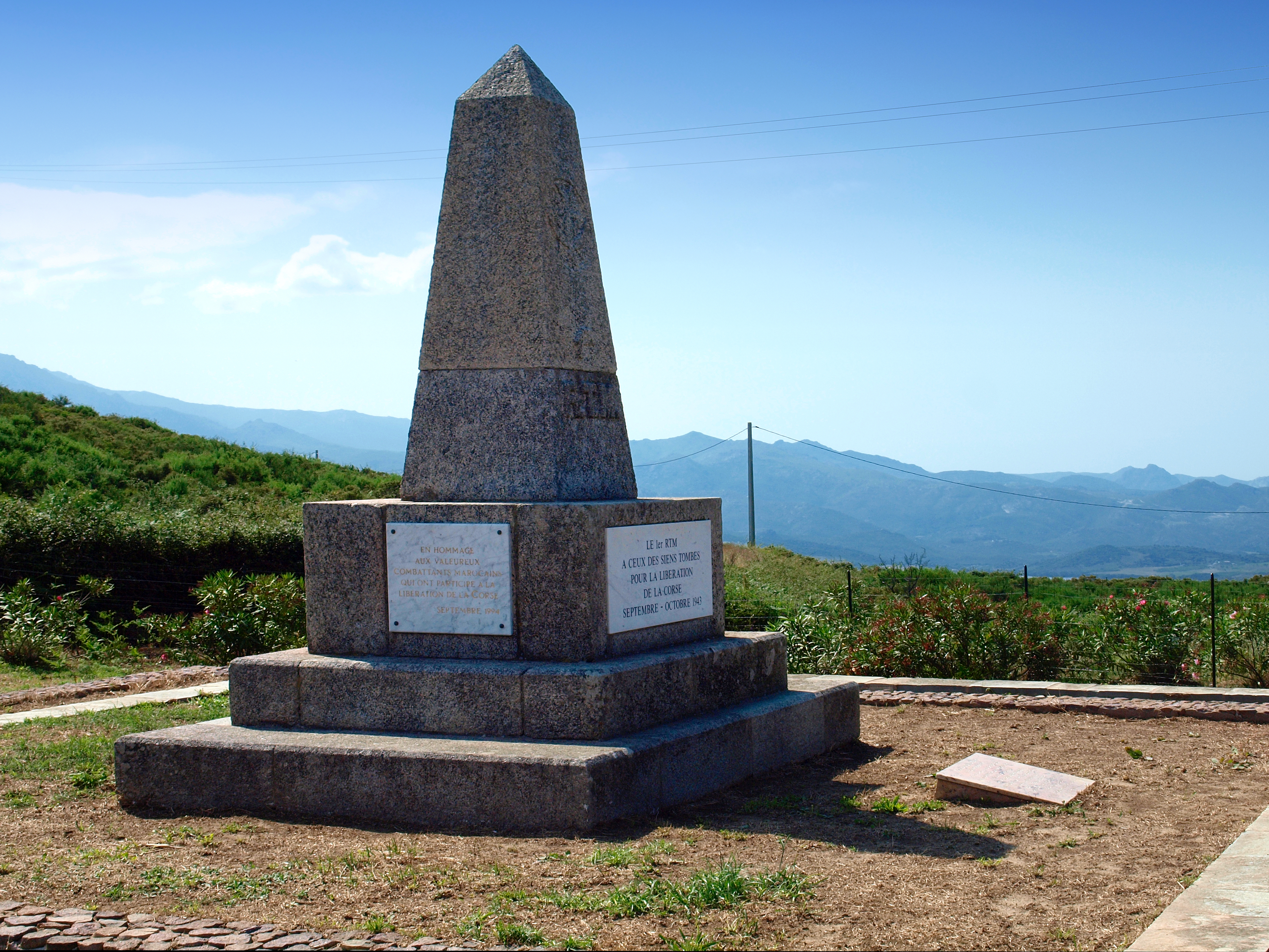 Olmeta-di-Tuda (Corse - Mémorial 1er RTM (Régiment Tirailleurs Marocains) au col de Santo Stefano